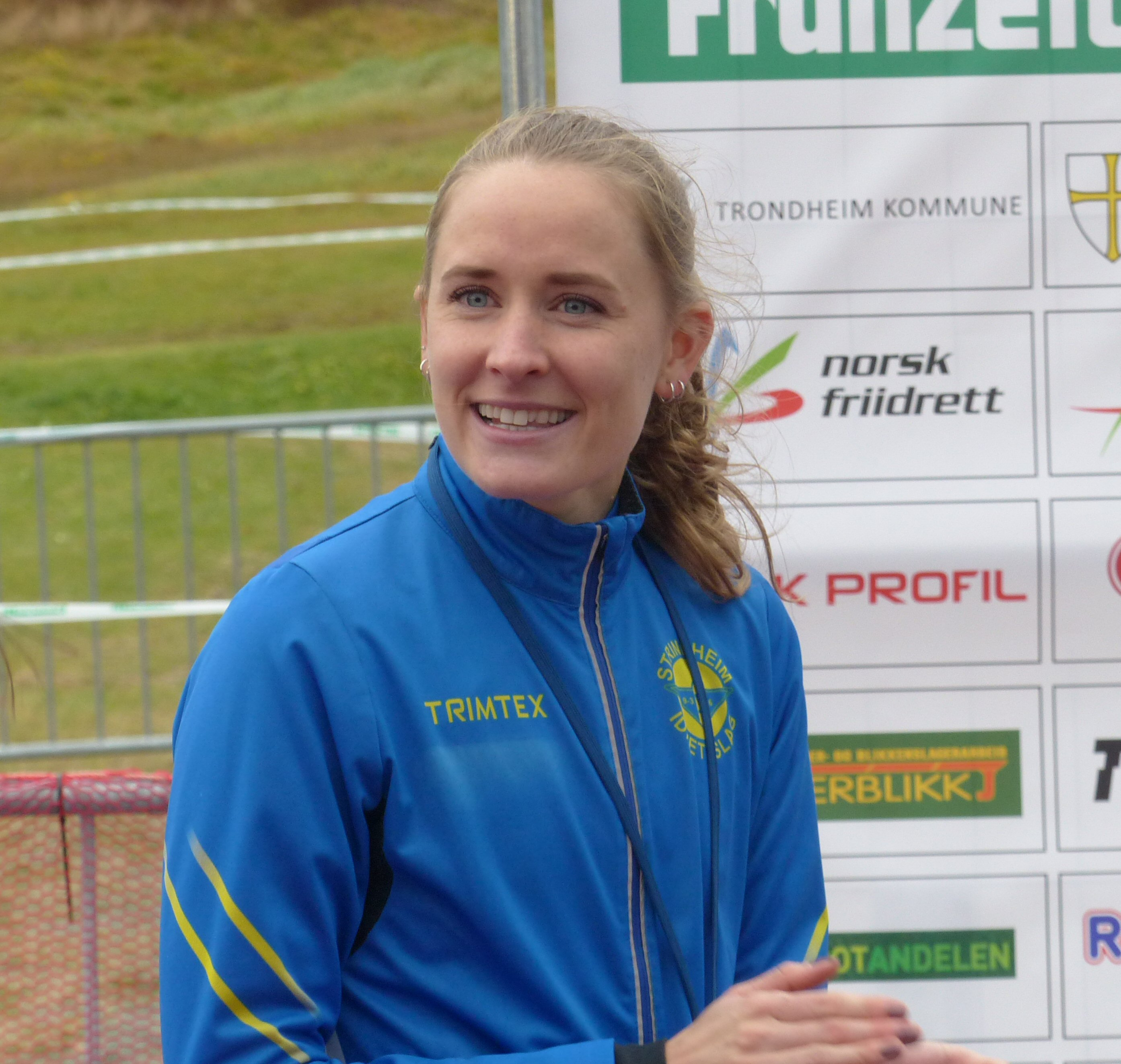 Mellomdistanseløper Hedda Hynne var premieutdeler under NM i terrengløp på Bratsberg i Trondheim i 2018.